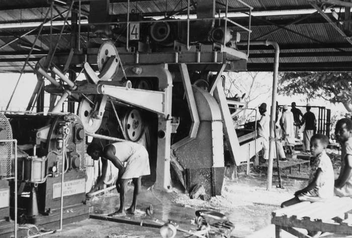 Een decorticator schilt de buitenste laag van de plantenstengels voor verdere verwerking van de vezels.